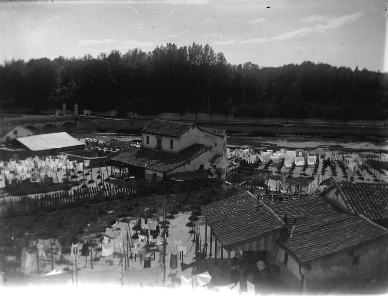 Antiguos lavaderos en la vega del río Manzanares de Madrid muy cerca de la ciudad. Las mujeres lavanderas lavaban allí la ropa y la devolvían limpia y planchada. Còpia digital del negatiu original de vidre. Llegat Dolors Moros, 2010 Museu d'Art Jaume Morera, Lleida. 2818